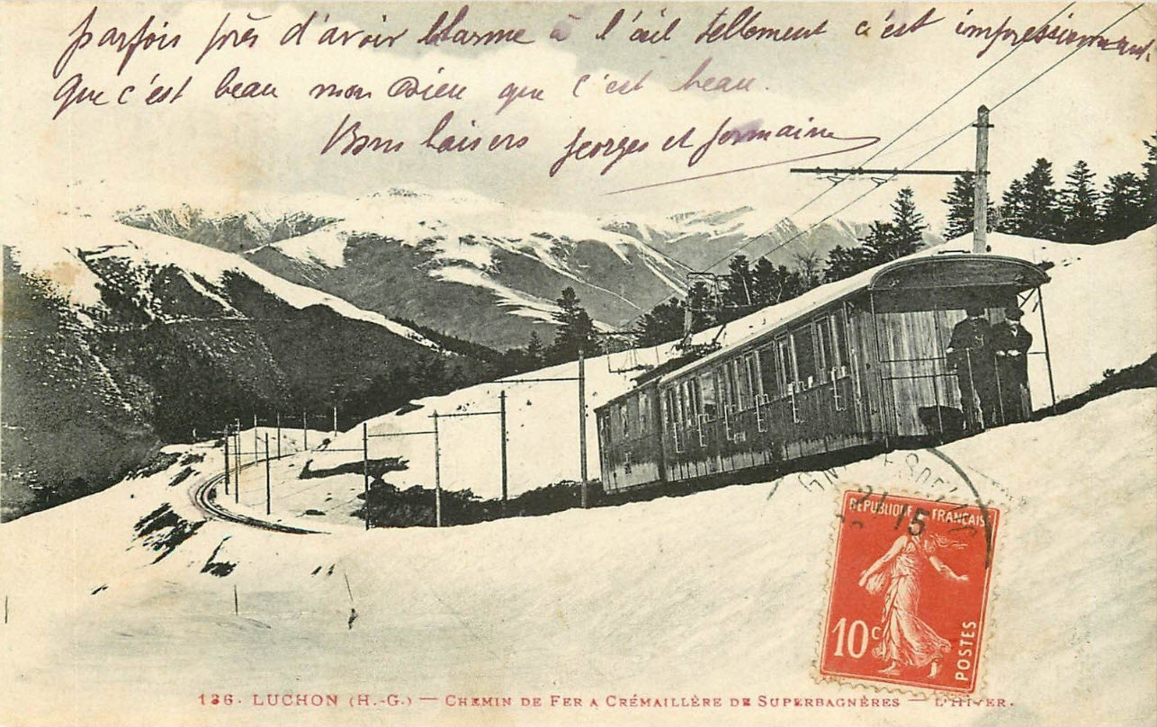 Ansichtskarte der Bergbahn Luchon–Superbagnères. Lok mit zwei Beistellwagen für zusammen 120 Fahrgäste. Hersteller der Lok: SLM (mechanischer Teil) und BBC (elektrischer Teil).